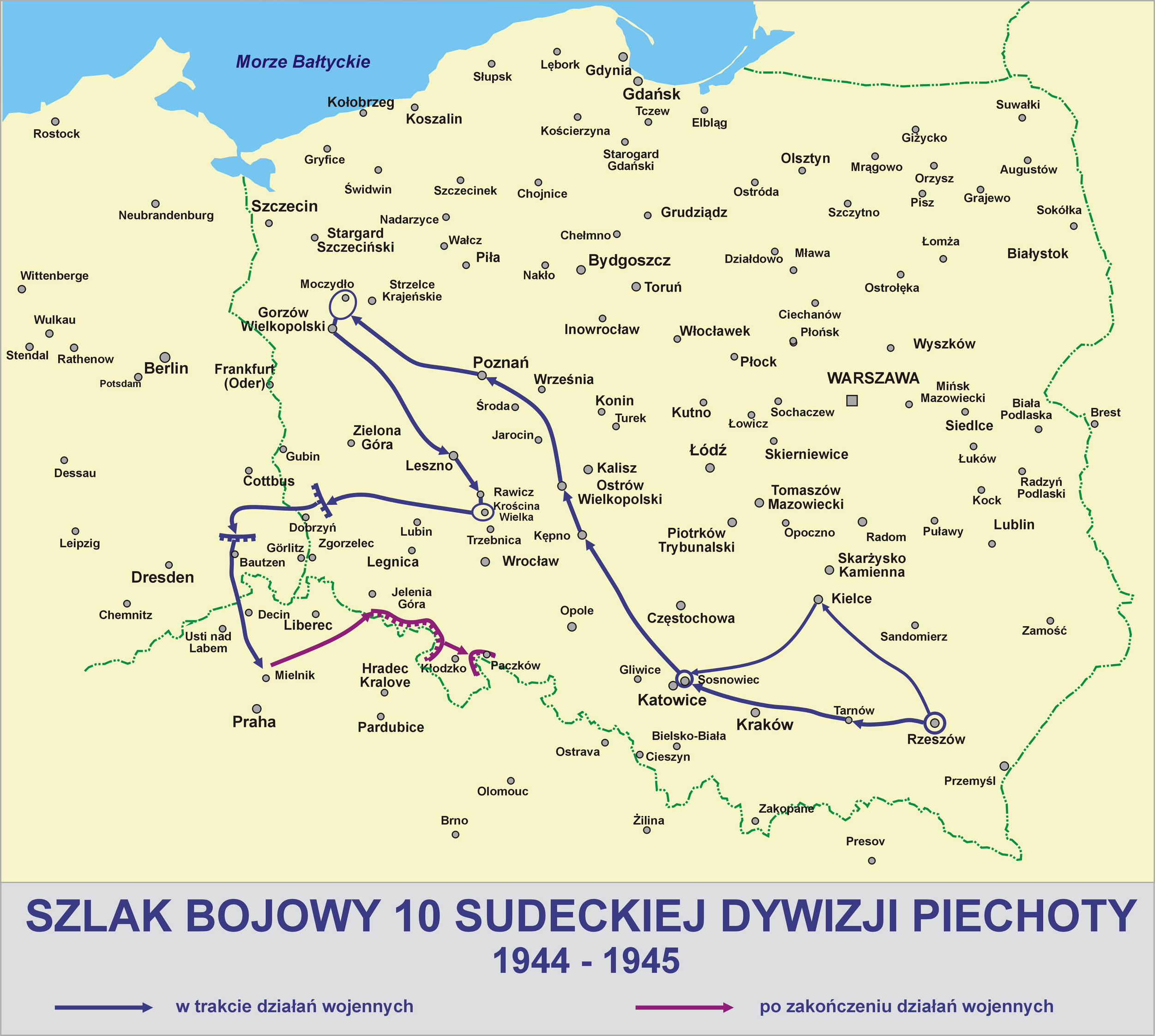 Szlak bojowy 10 Sudeckiej Dywizji Piechoty 1944 -1945